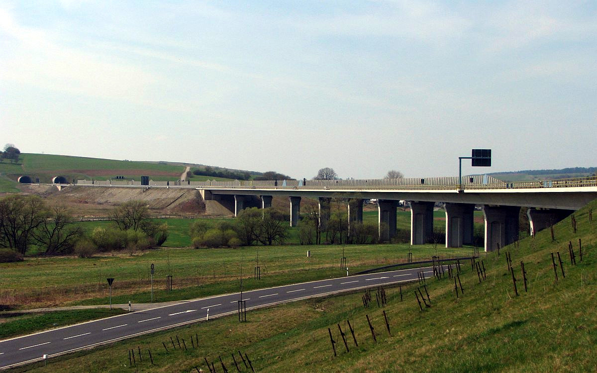 Walburg, Hessisch-Lichtenau, Wehretalbrücke von B7 aus Südost, H 13 m, L 530 m, 2001 bis 2004, Bundesautobahn 44 (A44), Gerdum und Breuer (Foto: 2009, Wolfgang Pehlemann, Wiesbaden, IMG_2801)